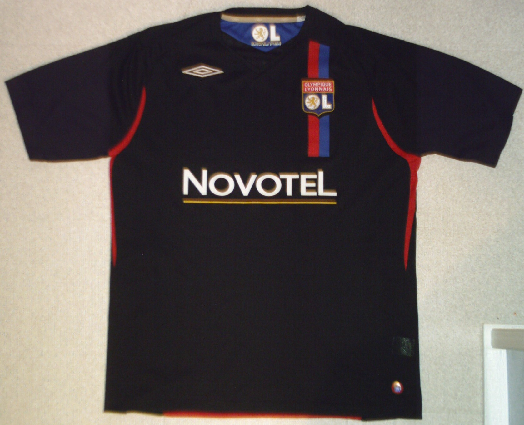 Maillot "Europe" de l'Olympique lyonnais pour la saison 2007-2008